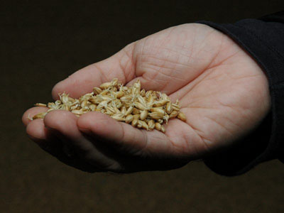 經過烘烤處理過的大麥芽 在麥芽威士忌的製作過程中，烘烤(Kilning)階段是將已經開始發芽的大麥，利用加熱的方式烤乾其內部水份以便中止其發芽過程的一道步驟。圖中明顯可見到這些zh:大麥已經長出了相當長度的芽，但尚未去除榖殼。 本圖片由上傳者zh:User:SElephant拍攝於2004年8月。